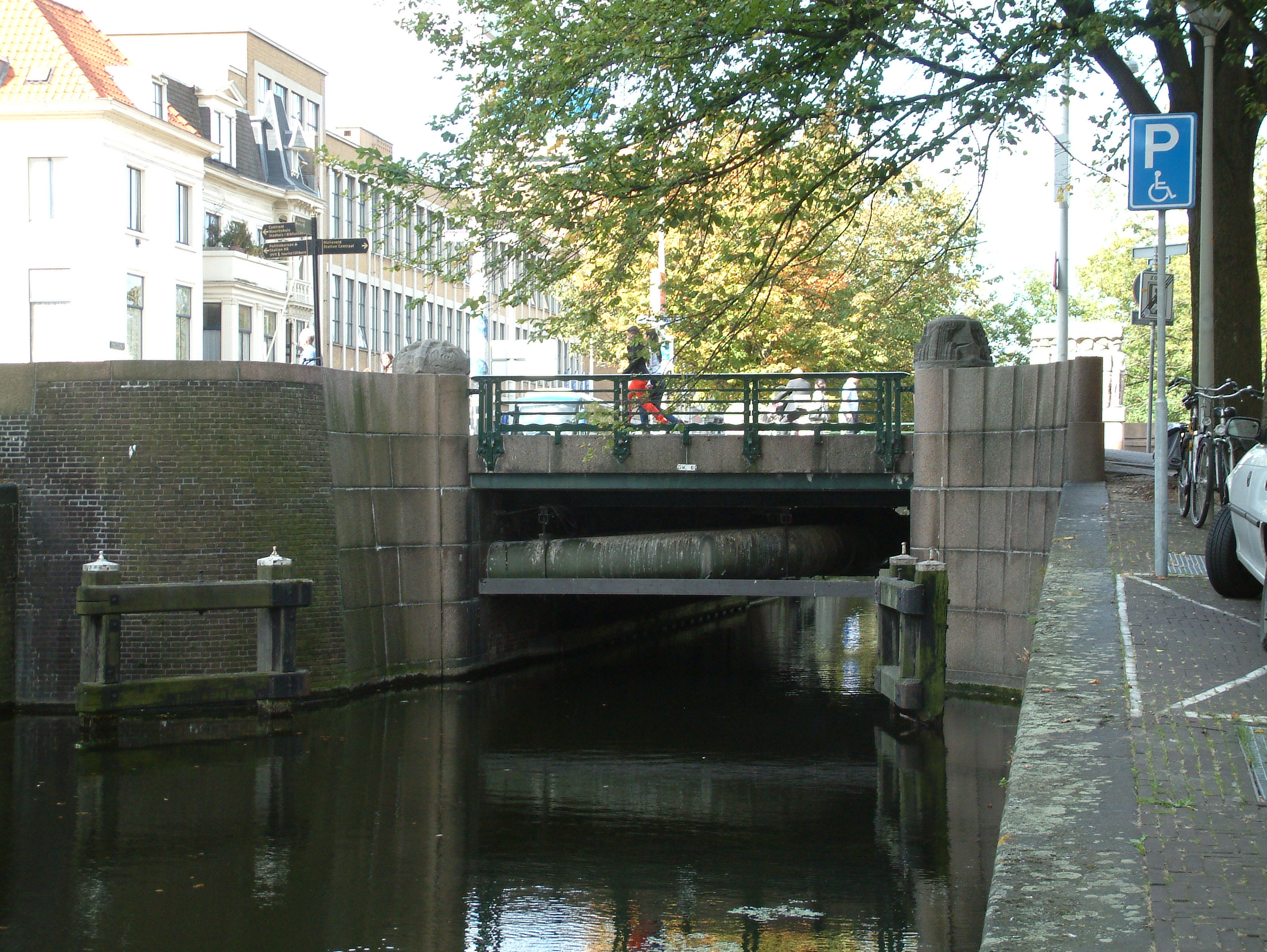 Brug in Den Haag